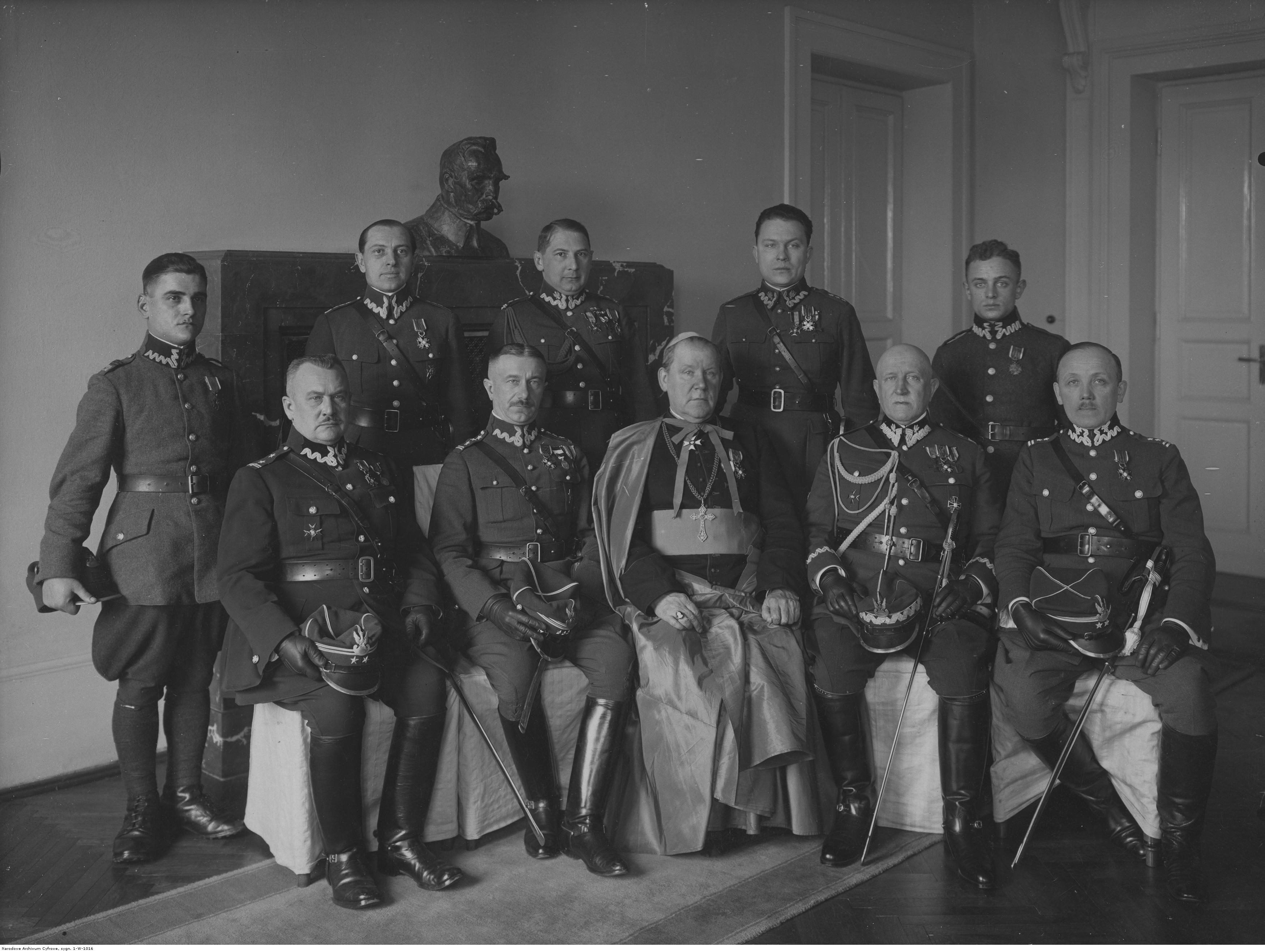 Dekoracja zasłużonych żołnierzy Krzyżami Zasługi w Warszawie; marzec 1926. Fotografia grupowa odznaczonych Krzyżami Zasługi oficerów WP. Widoczni m.in.: odznaczeni Złotymi Krzyżami Zasługi ksiądz biskup polowy WP Stanisław Gall (w środku), gen. bryg. Stanisław Gurbski (siedzi drugi z prawej), płk dr Konrad Millak (siedzi, drugi z lewej), ppłk Teodor Furgalski (stoi 3. z lewej), ppłk Radwański, ppłk Korzon. Srebrne Krzyże otrzymali: kapitan Makatrowicz i kapitan Lemko, brązowe: plutonowy Koprowski oraz szeregowy Gercyk. Koncern Ilustrowany Kurier Codzienny - Archiwum Ilustracji. Sygnatura: 1-W-1016